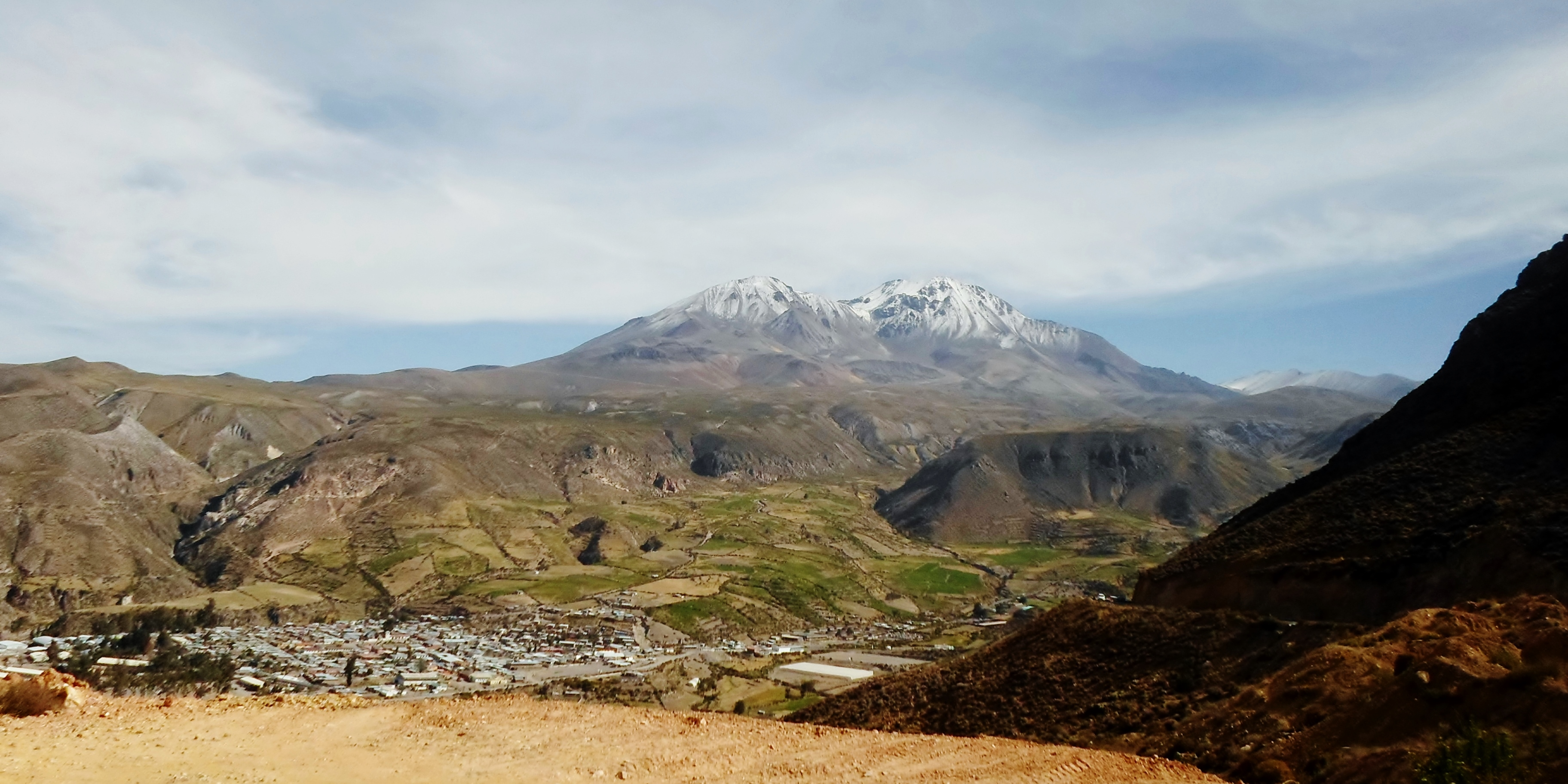 Vista a un pueblo desde la ruta de arica a Putre. En el fondo es el volcán Taapaca